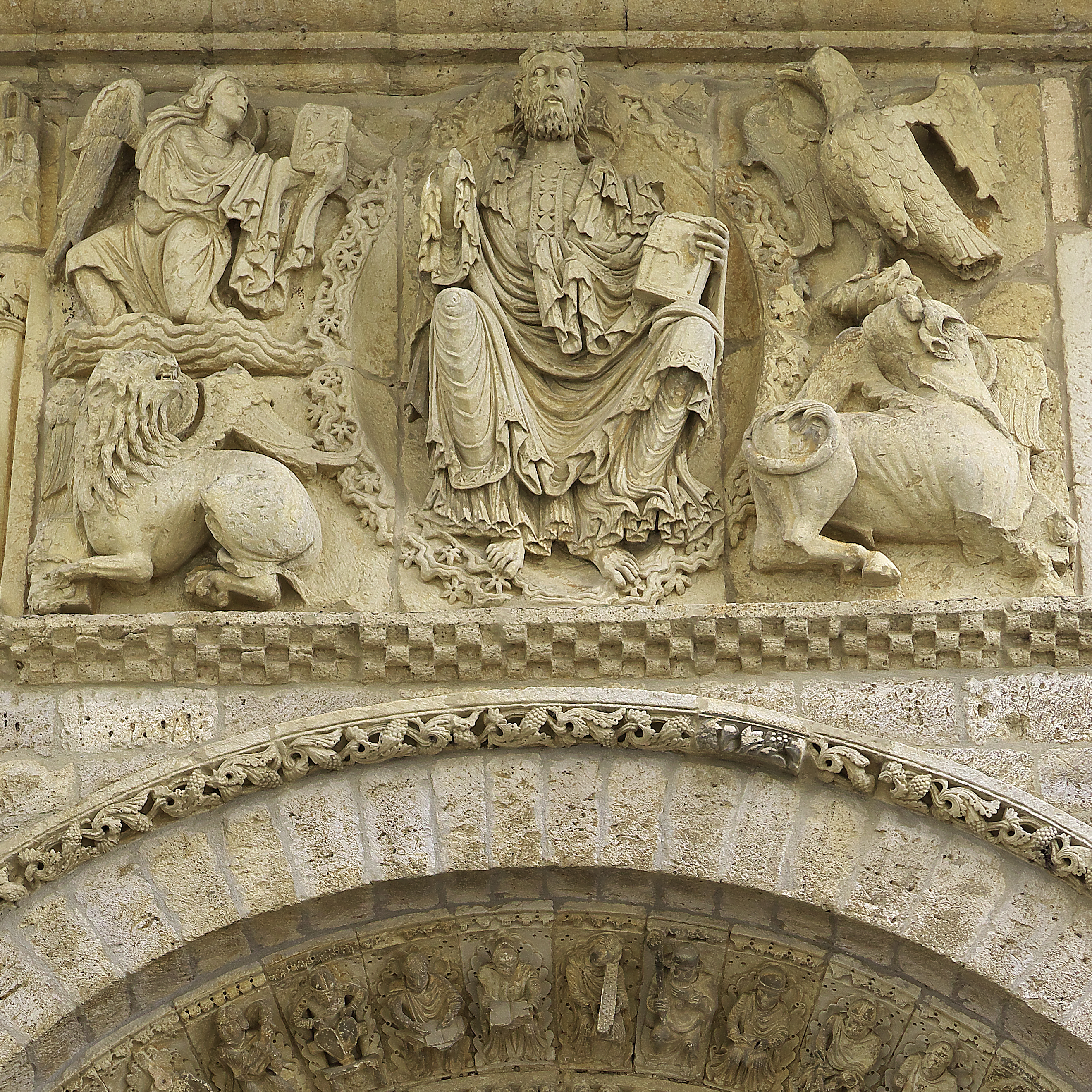 Iglesia de Santiago, Carrión de los Condes (1165). En el friso de la fachada principal, Maiestas Dominis rodeado del Tetramorfo. Representación destacada en los relieves románicos europeos.